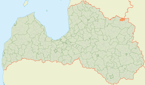 Маркалнская волость на карте ЛатвииLatviešu: Mārkalnes pagasts